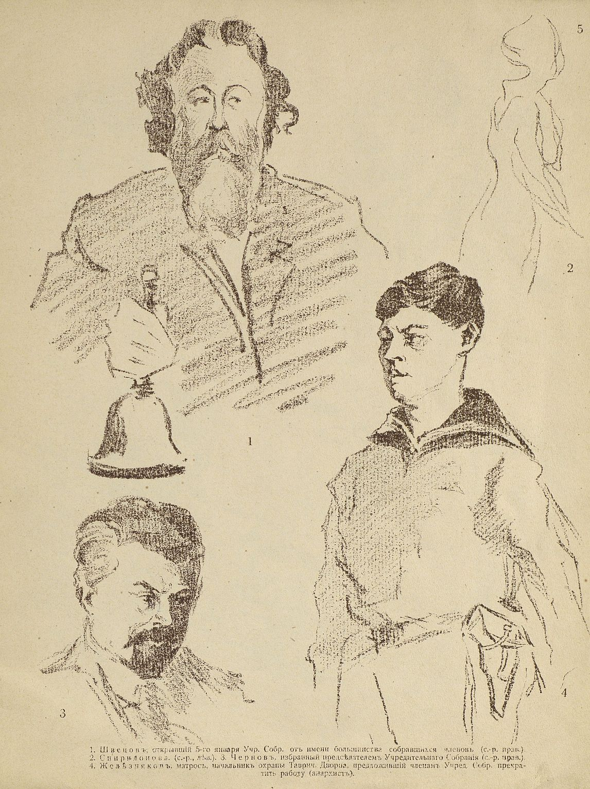 Арцыбушев, Юрий Константинович. "Диктатура пролетариата" в России: Политические деятели на заседаниях советов раб., солдат. и крест. депутатов, учредительного собрания, крестьянских съездов и проч. в декабре 1917 и в январе 1918 гг. : [Альбом] / Ю. К. Арцыбушев. - М. : Изд-во И. Кнебель, 1918. - 31 с. ил., портр. В 1926 году рисунки проданы автором Русскому заграничному историческому архиву (РЗИА) в Праге: сегодня ГА РФ (Р-7030, oп. 1). В настоящее время доступ к этому собранию полностью открыт.